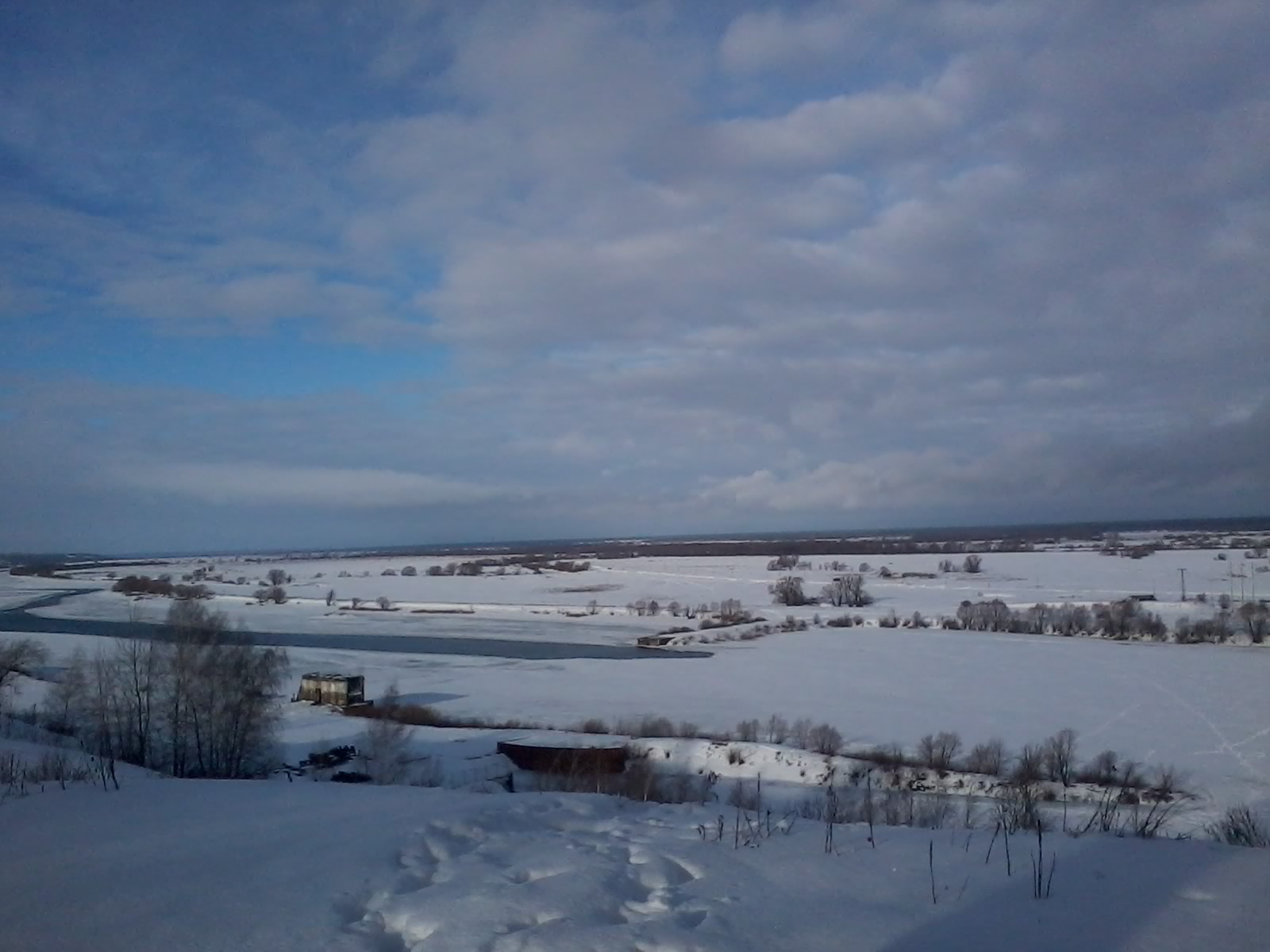 Кузьминский шлюз